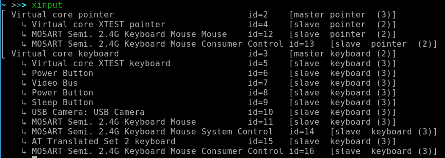 El archivo es una captura de pantalla de la terminal de Linux, mostrando la salida del comando xinput